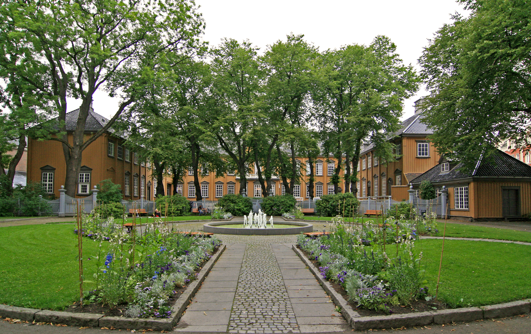 Stiftsgårdsparken, Trondheim.